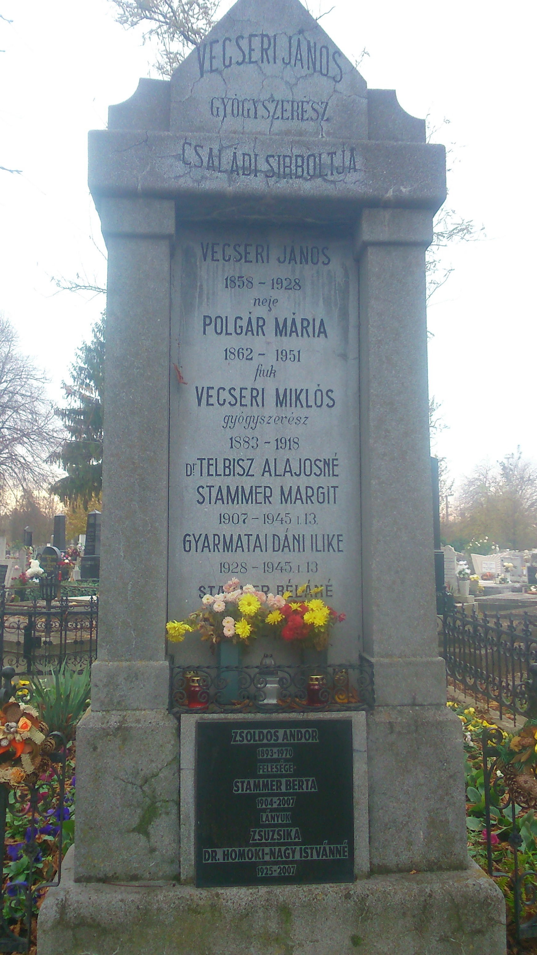 Zsoldos Andor (1893-1970) nyughelye Vecseri János gyógyszerész családi sírboltjában Tomb of Andor Zsoldos (1893-1970) in János Vecseri family tomb